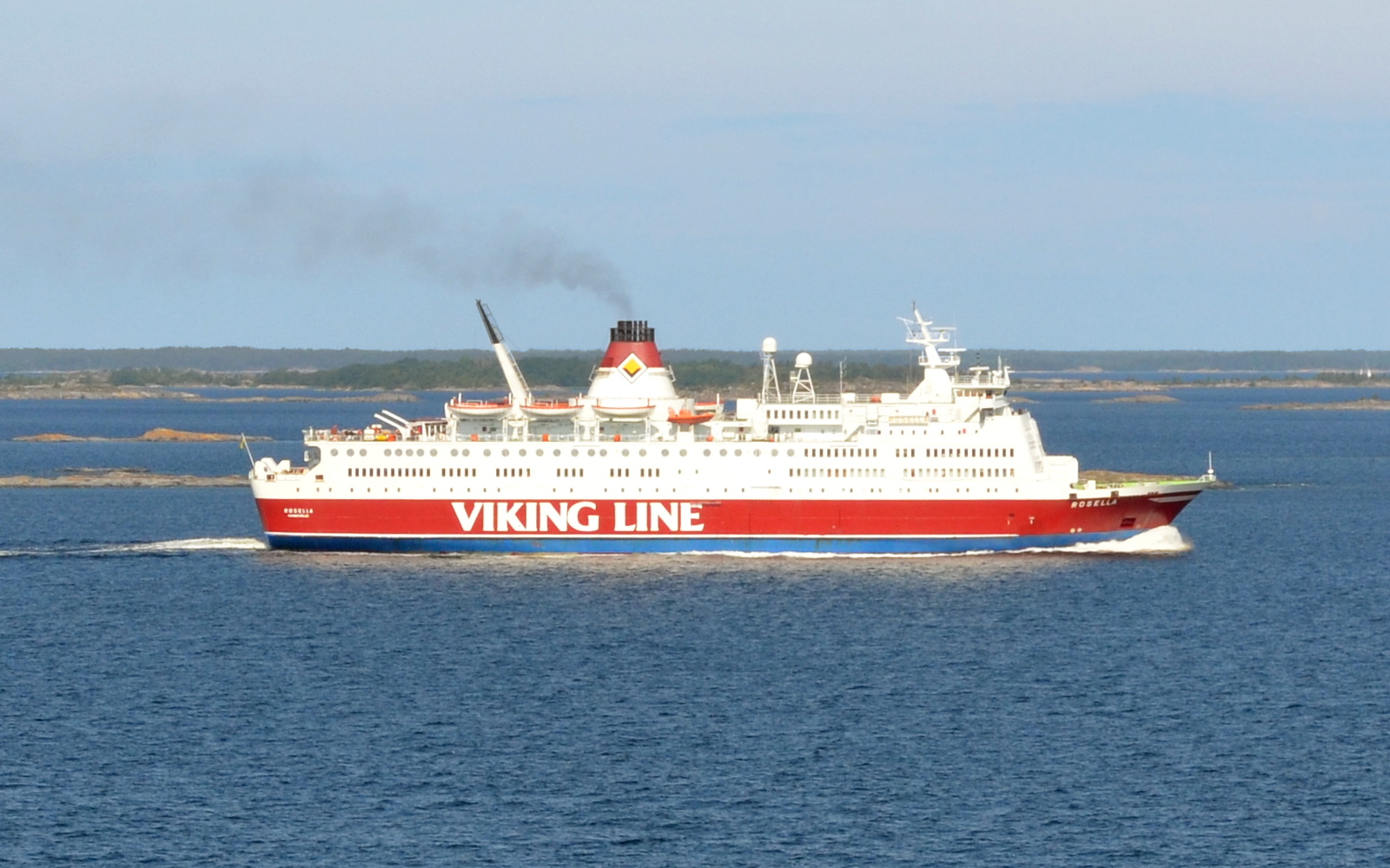 Viking Line fartyg M/S Rosella.